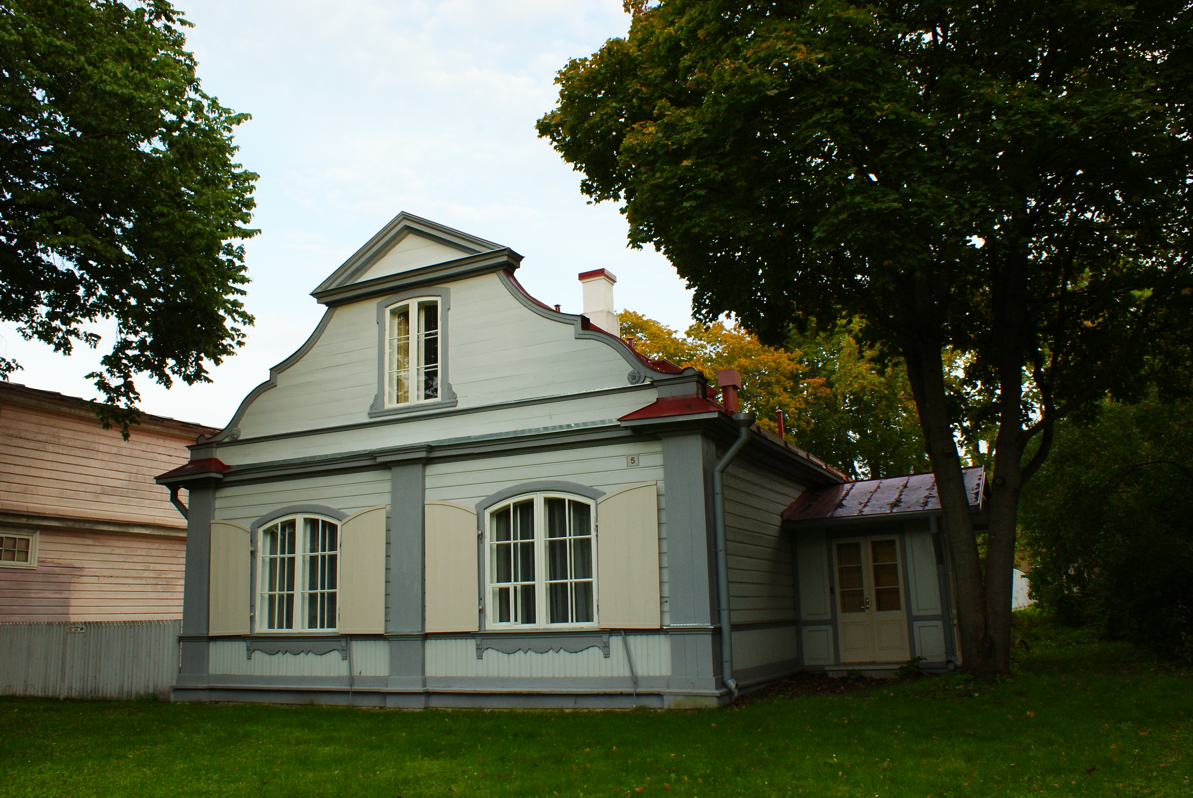 Kadrioru lossi teenijate maja